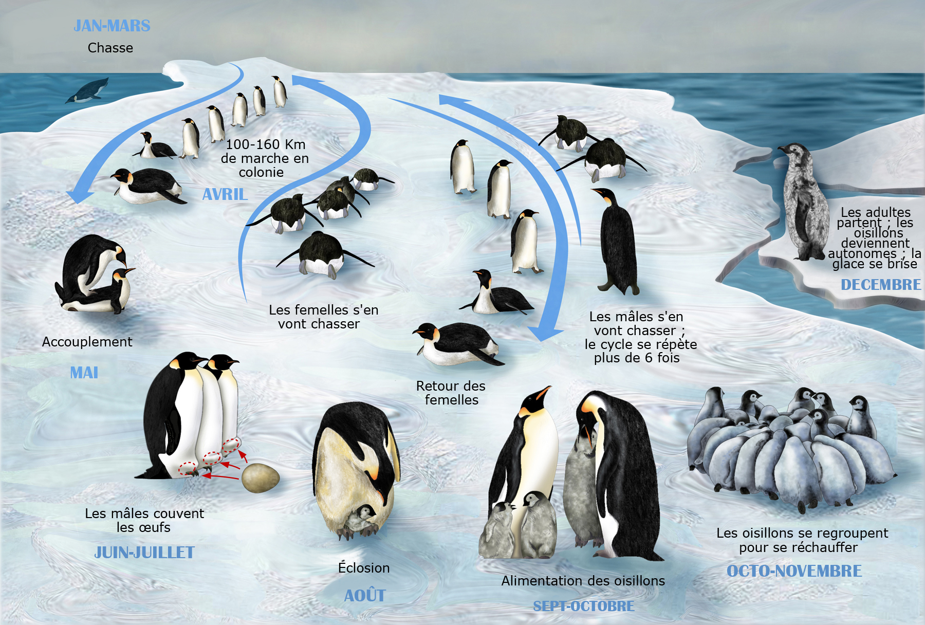 Version française du schéma sur le cycle de vie du Manchot empereur